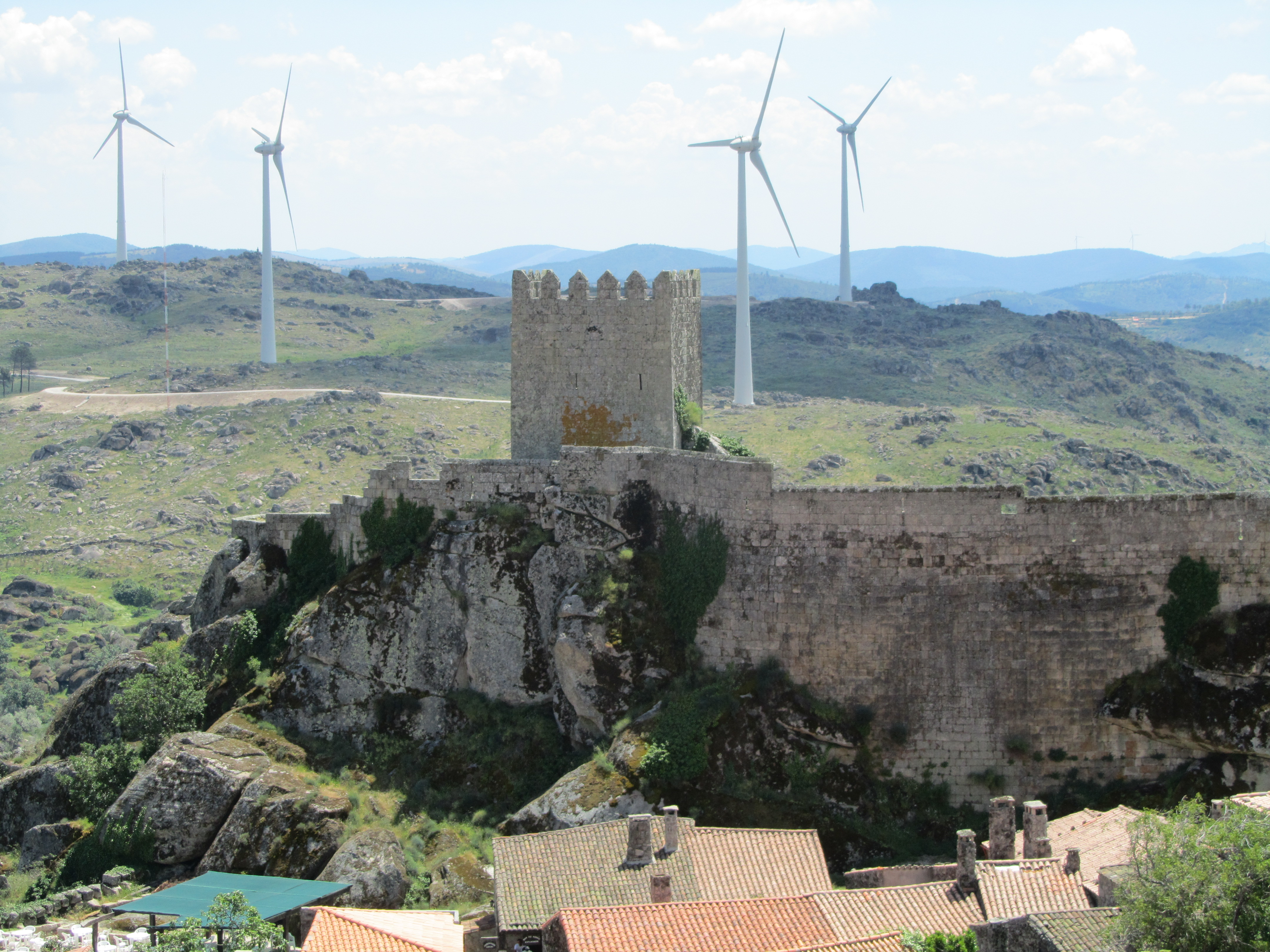 O Castelo de Sortelha no meio dos aerogeradores, 2011